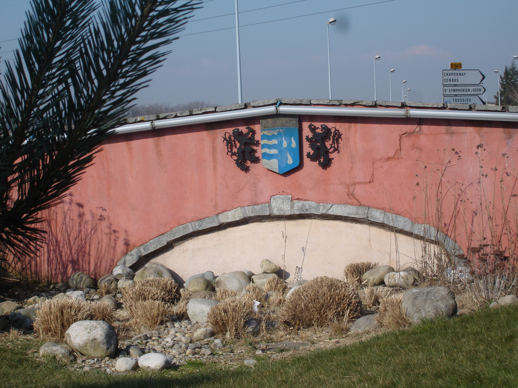 Mions (69) : carrefour de la croix rouge